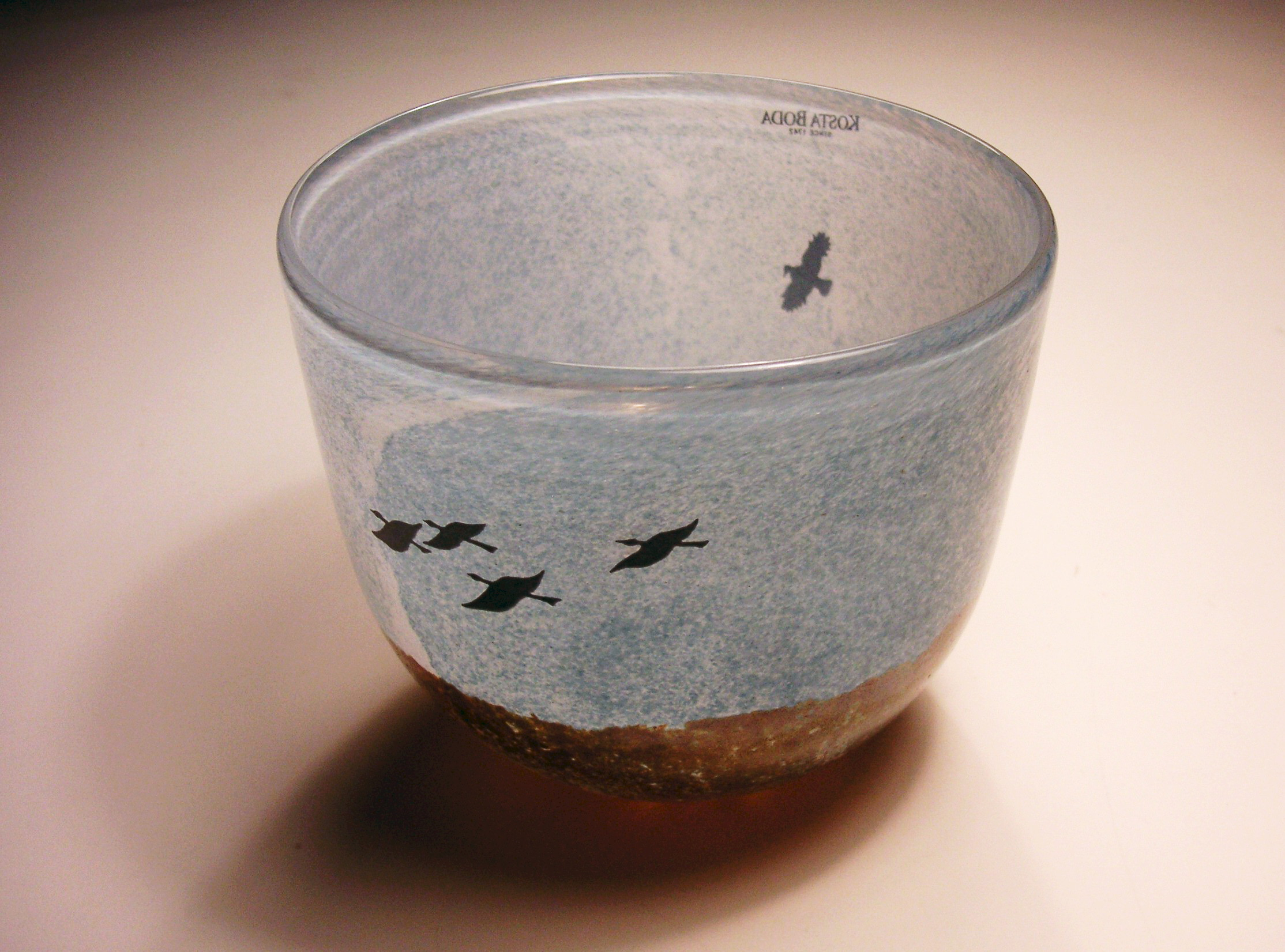 Kjell Engman glasskål